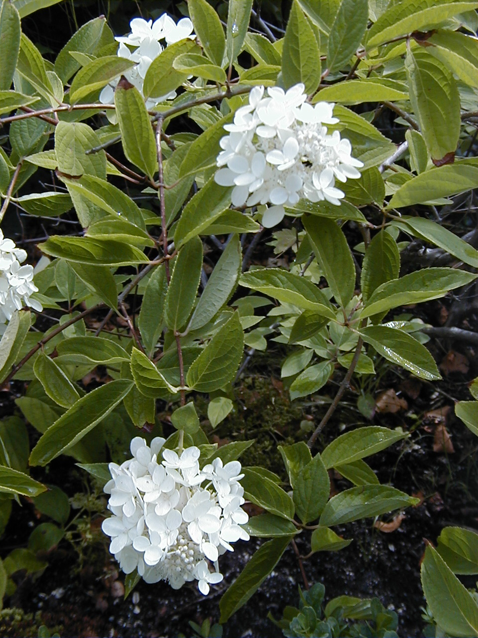 Hydrangea heteromalla 'Bretschneideri'. Real Jardín Botánico, Madrid